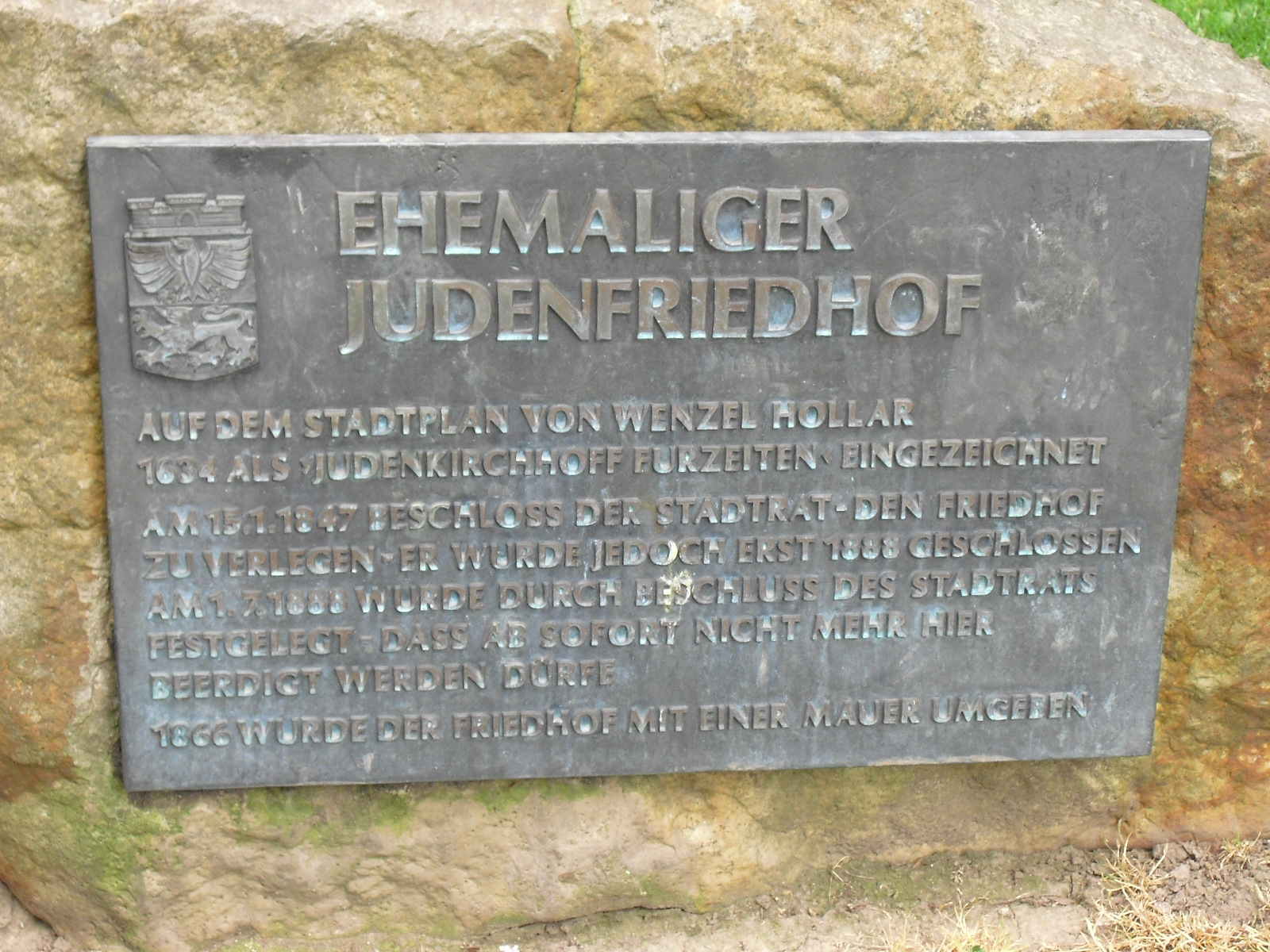 Die Gedenktafel am alten jüdischen Friedhof in der Arnoldsweilerstraße in Düren